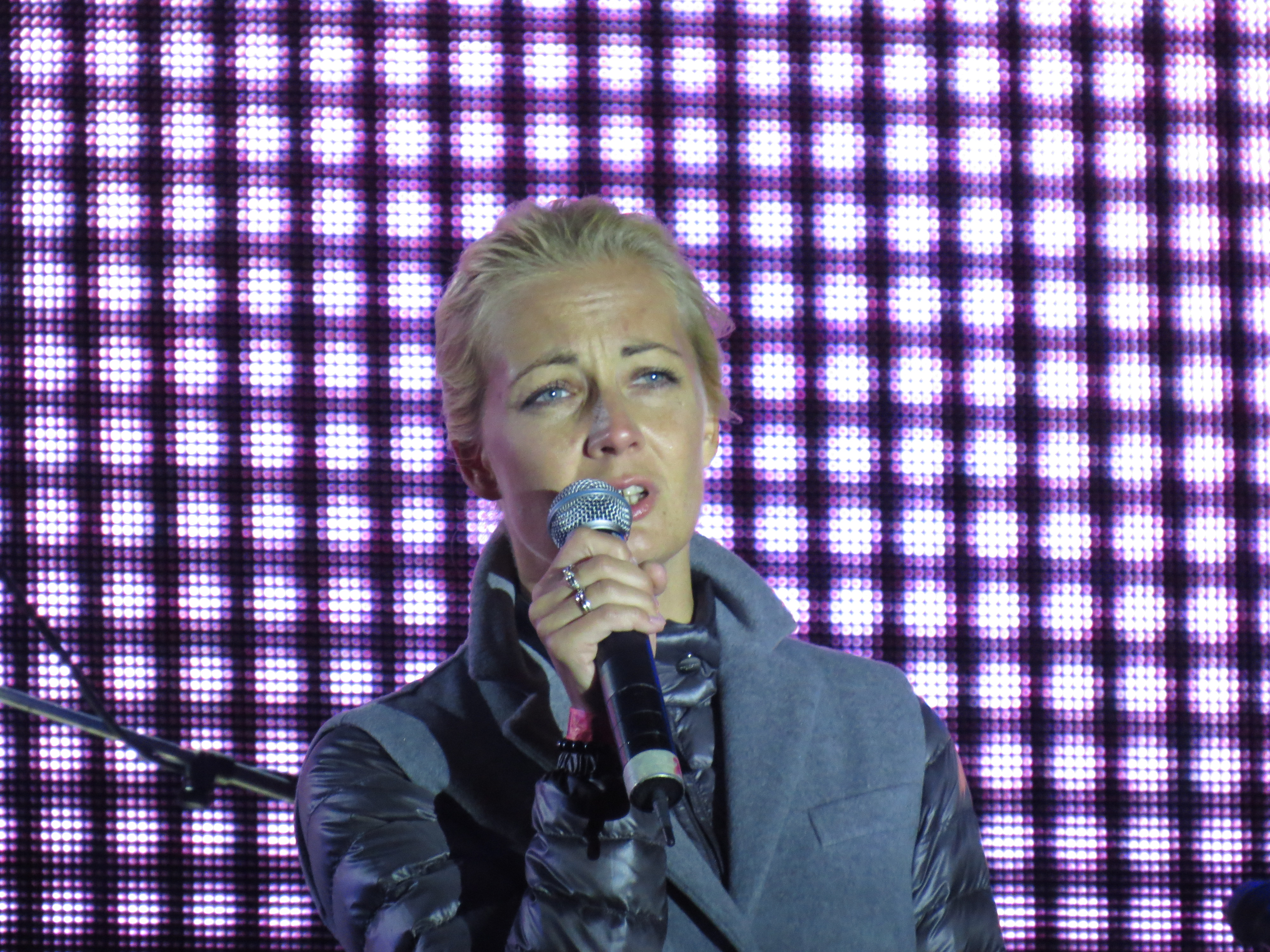 Юля Навальная на концерте-митинге в поддержку кандидата в мэры Москвы Алексея Навального на проспекте Сахарова 6 сентября 2013 года